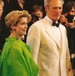 Catherine Deneuve et Clint Eastwood au Festival de Cannes